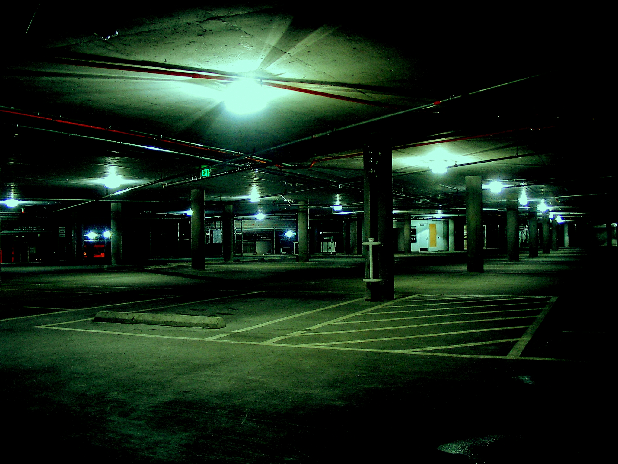 Parking garage